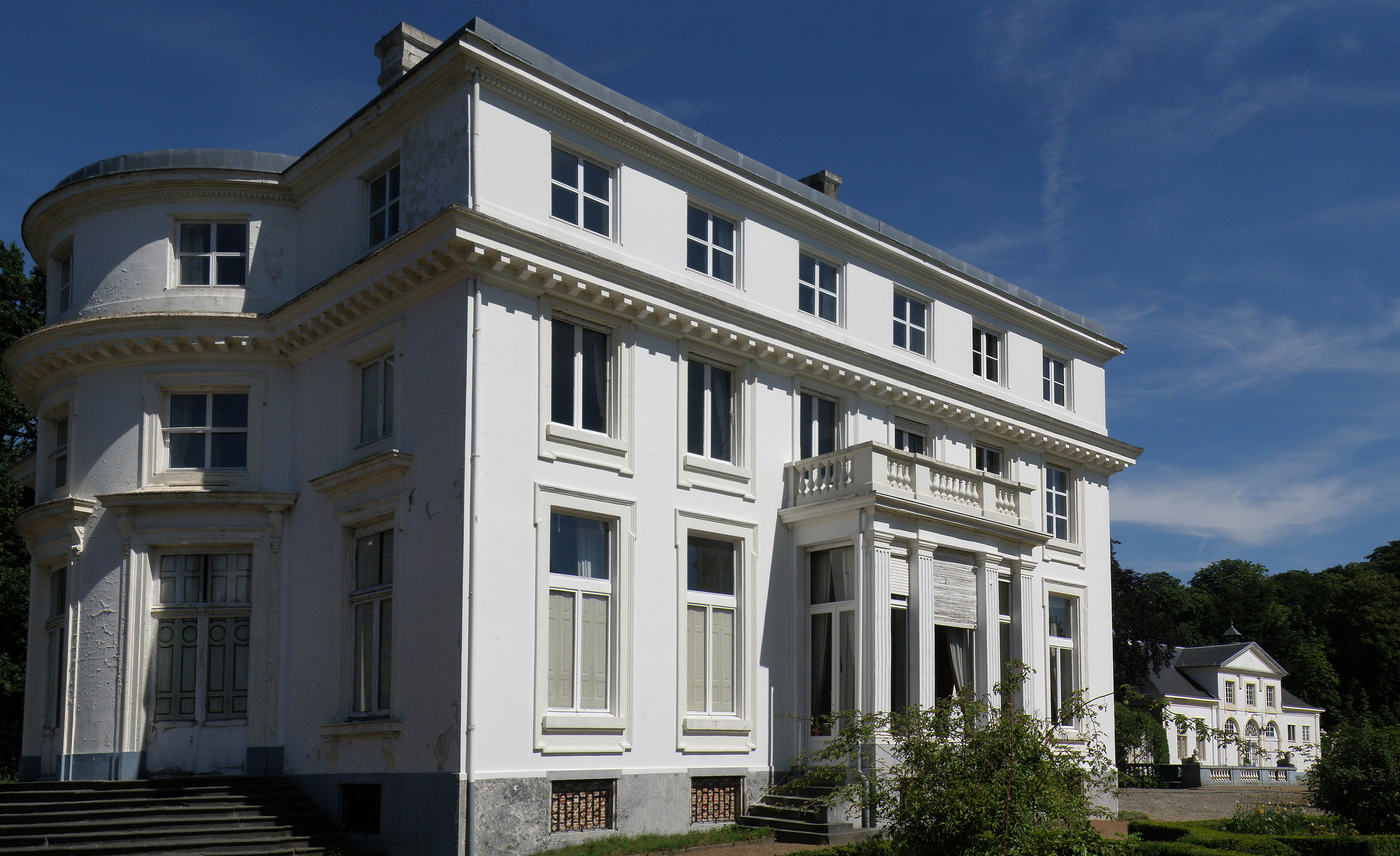 Edegem (prov. Antwerpen, België). Hof ter Linden.